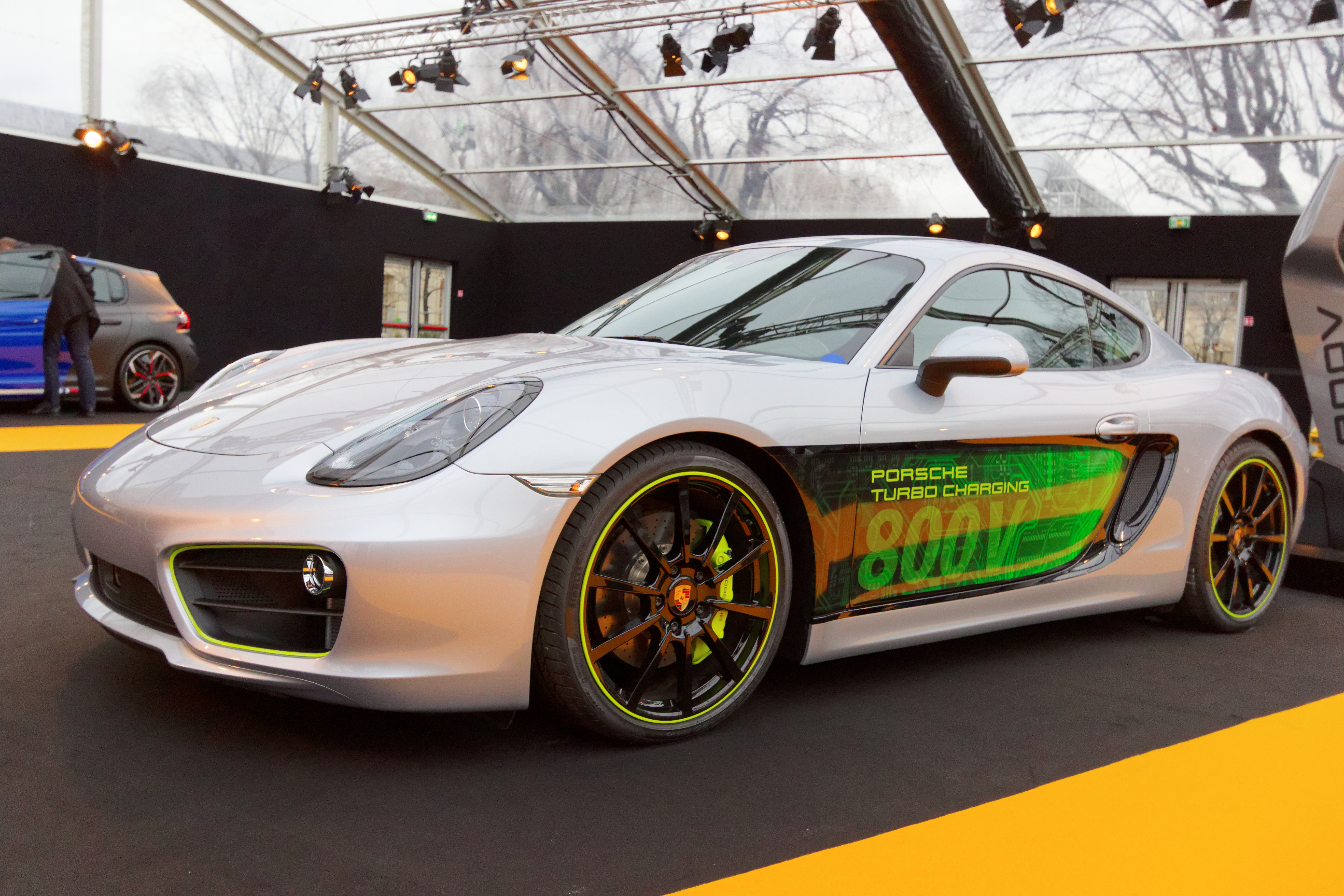 La Porsche Cayman E-Volution exposée lors du festival automobile international 2016.